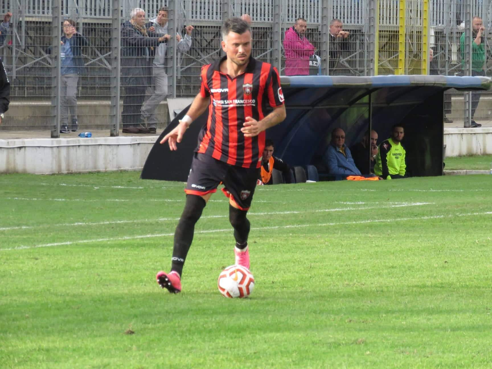 Il calciatore italiano Emanuele D'Anna in azione con la casacca della Nocerina.